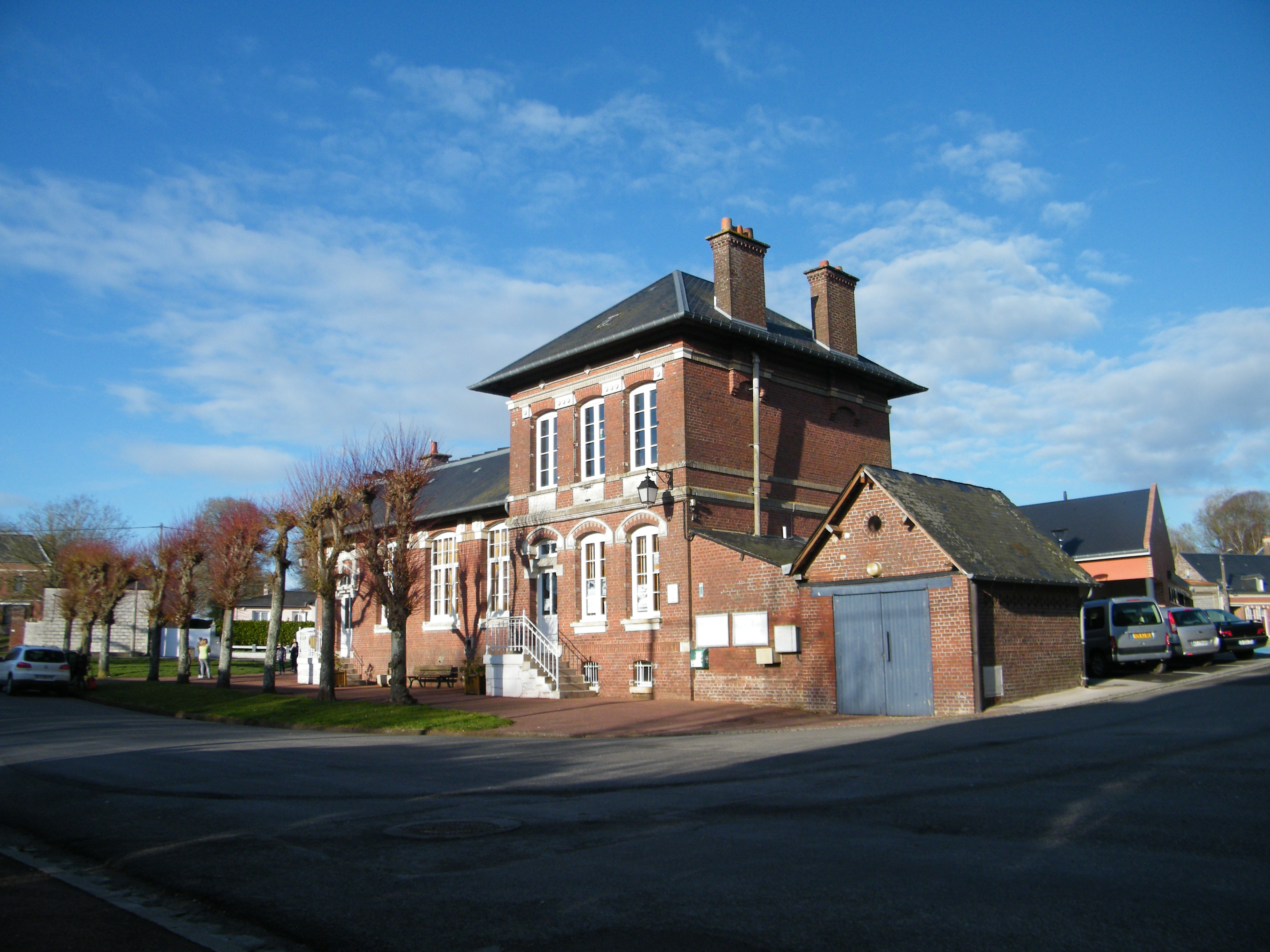 La mairie et l'école.